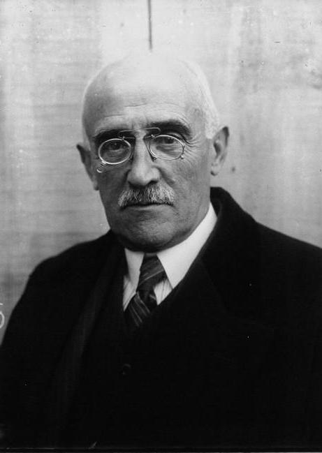 Reims : congrès radical socialiste : Pievre [illisible], député du Jura